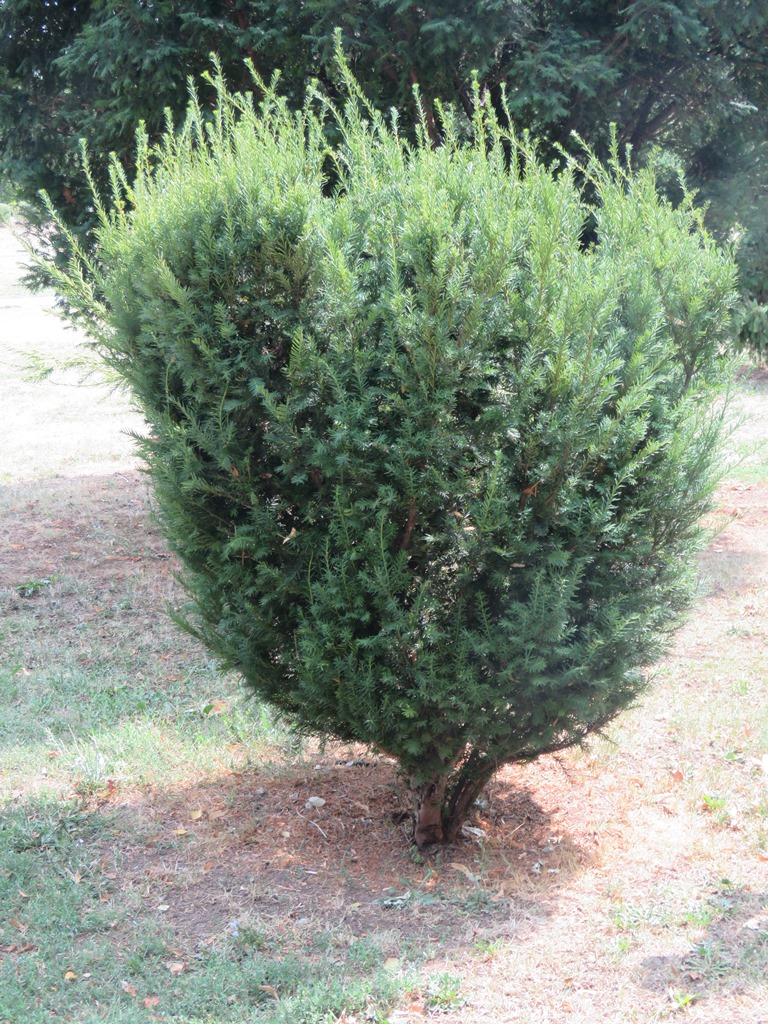 Srpski (latinica): Biljke parkova u Nišu